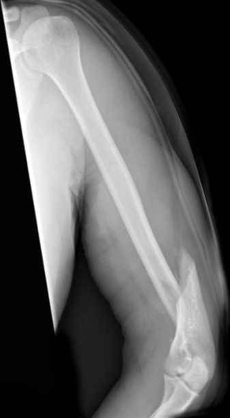 spiralförmiger Bruch des Humerusschafts